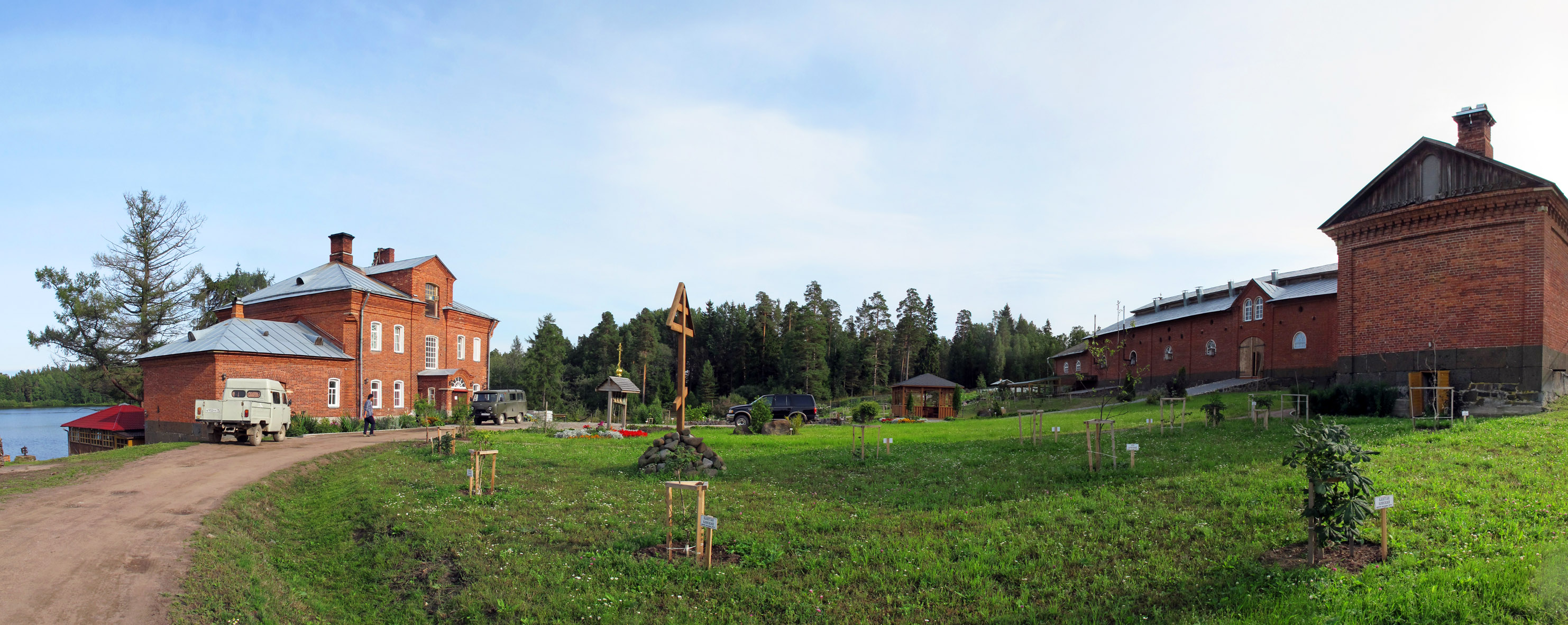 Монастырская ферма (Республика Карелия, Сортавала, остров Валаам)